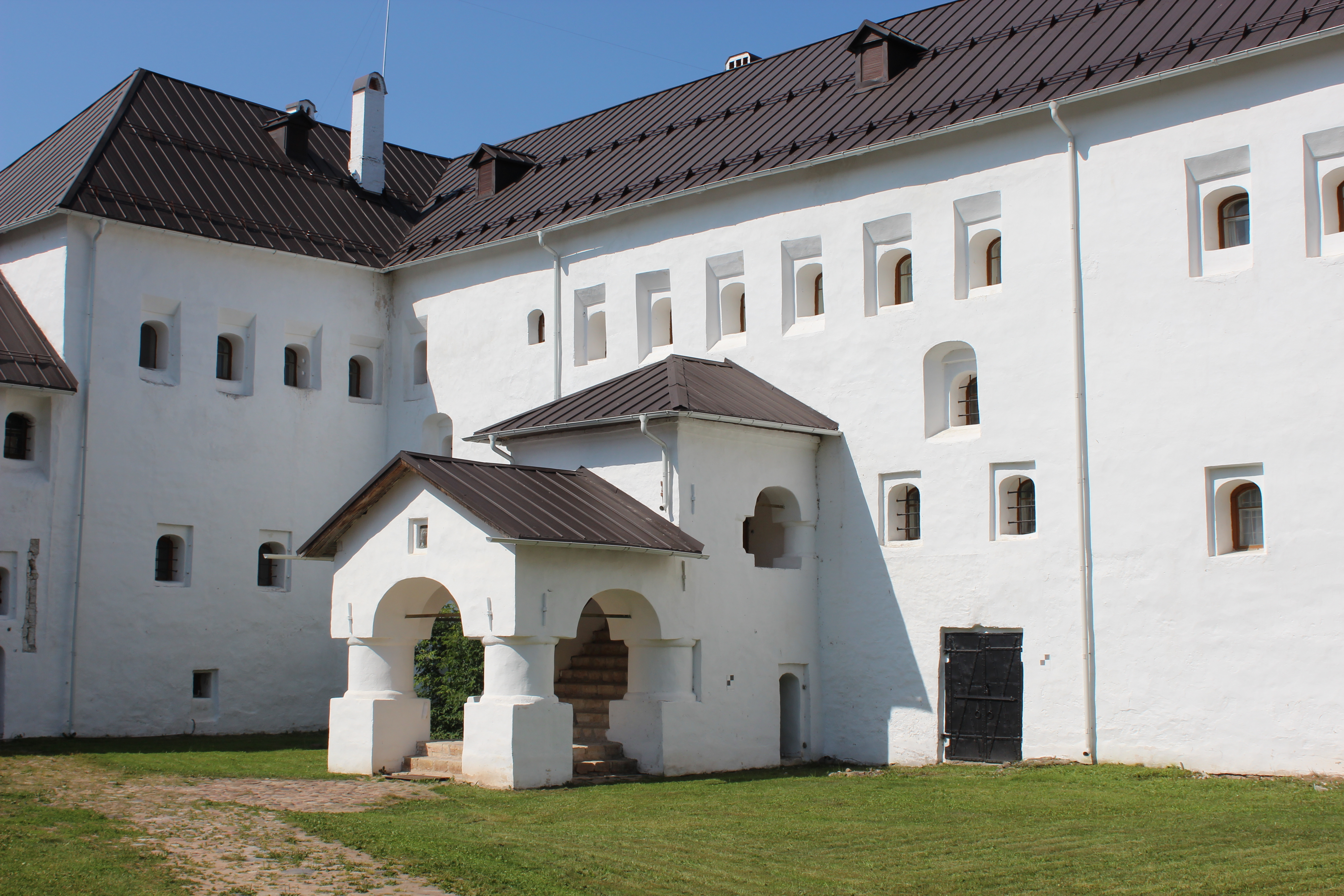 Палаты Поганкиных (Поганкины палаты) (Псковская область, Псков, Некрасова улица, 7)